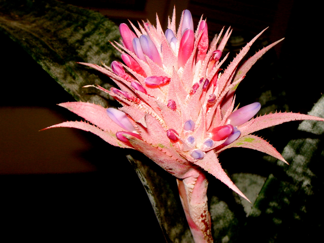 Bromélia Rosa